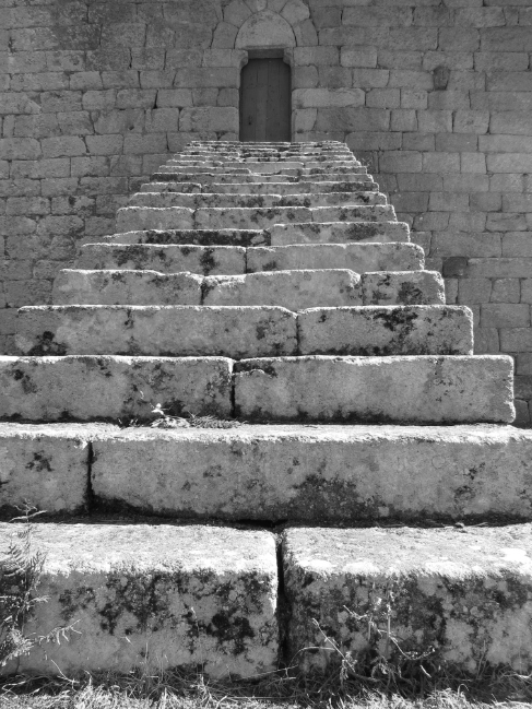 vista de la escalera